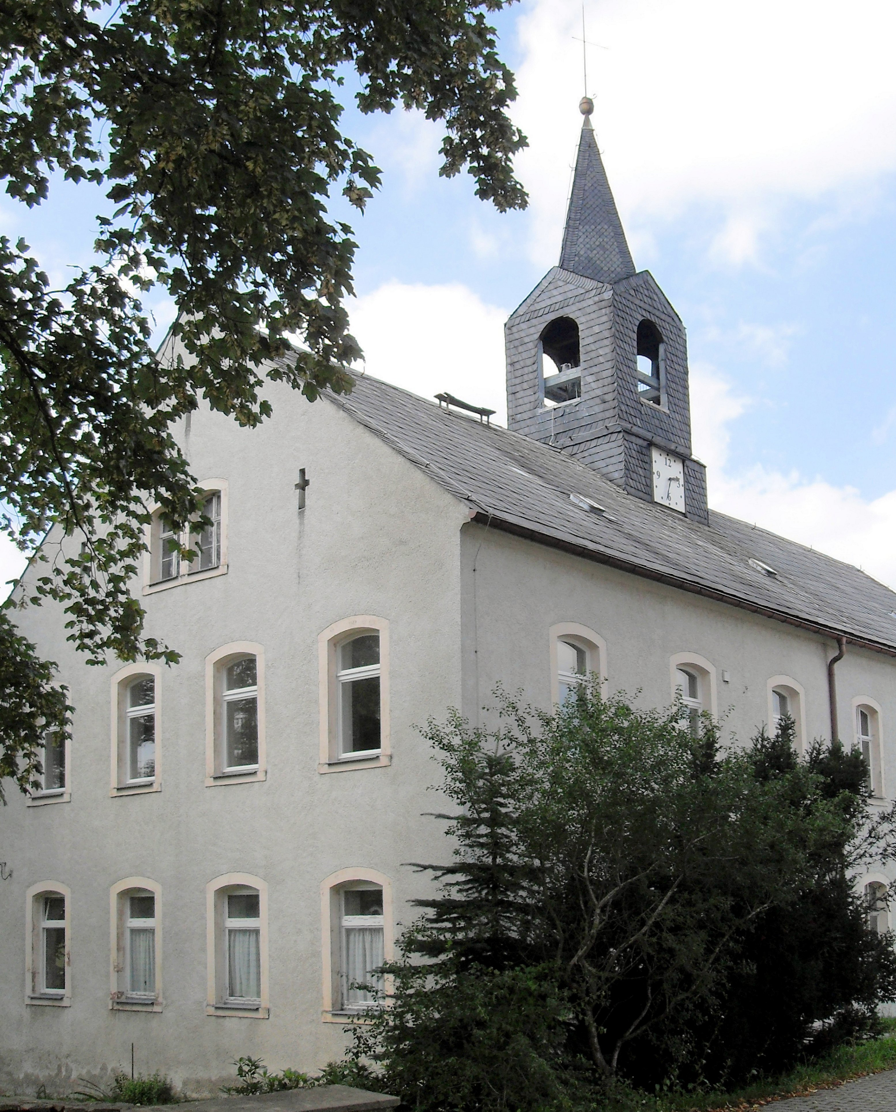 Alte Schule und Bethaus in Gränitz, Landkreis Mittelsachsen